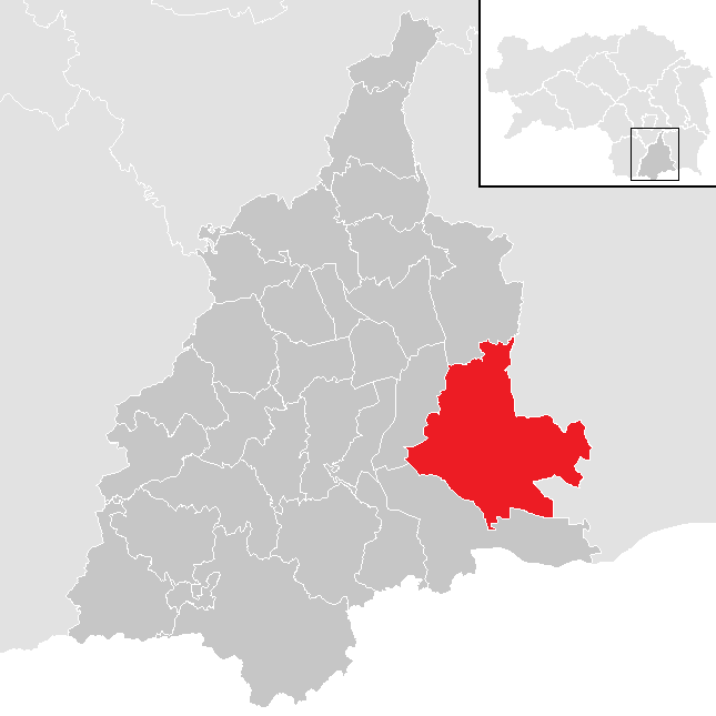 Lage von Sankt Veit in der Südsteiermark im Bezirk Leibnitz